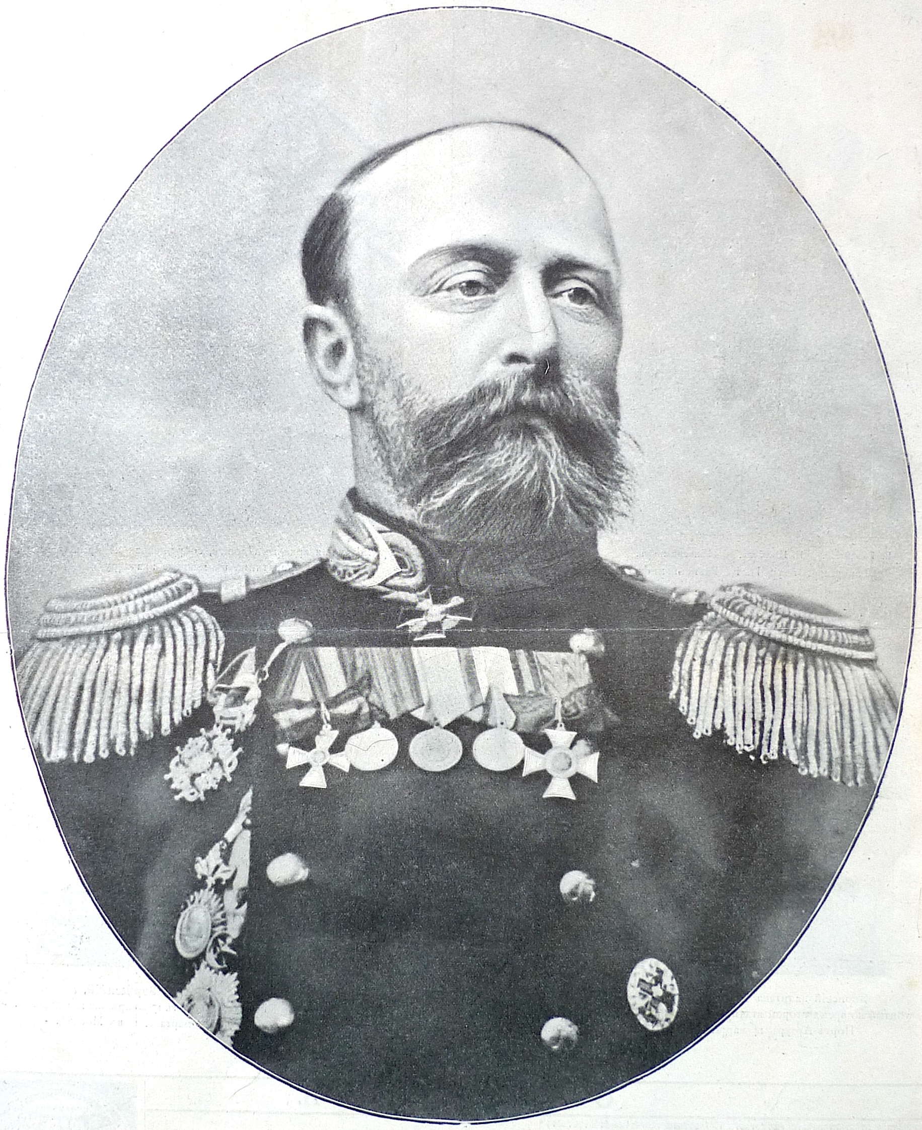 Всеволод Фёдорович Руднев. Данное изображение было также использовано в статье «Варяг» опубликованной в пятом томе «Военной энциклопедии», который был издан книгоиздательским товариществом Ивана Дмитриевича Сытина в 1911 году в столице Российской империи городе Санкт-Петербурге.